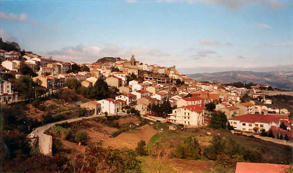 Montefalcone di Val Fortore (Benevento, Italy): panorama